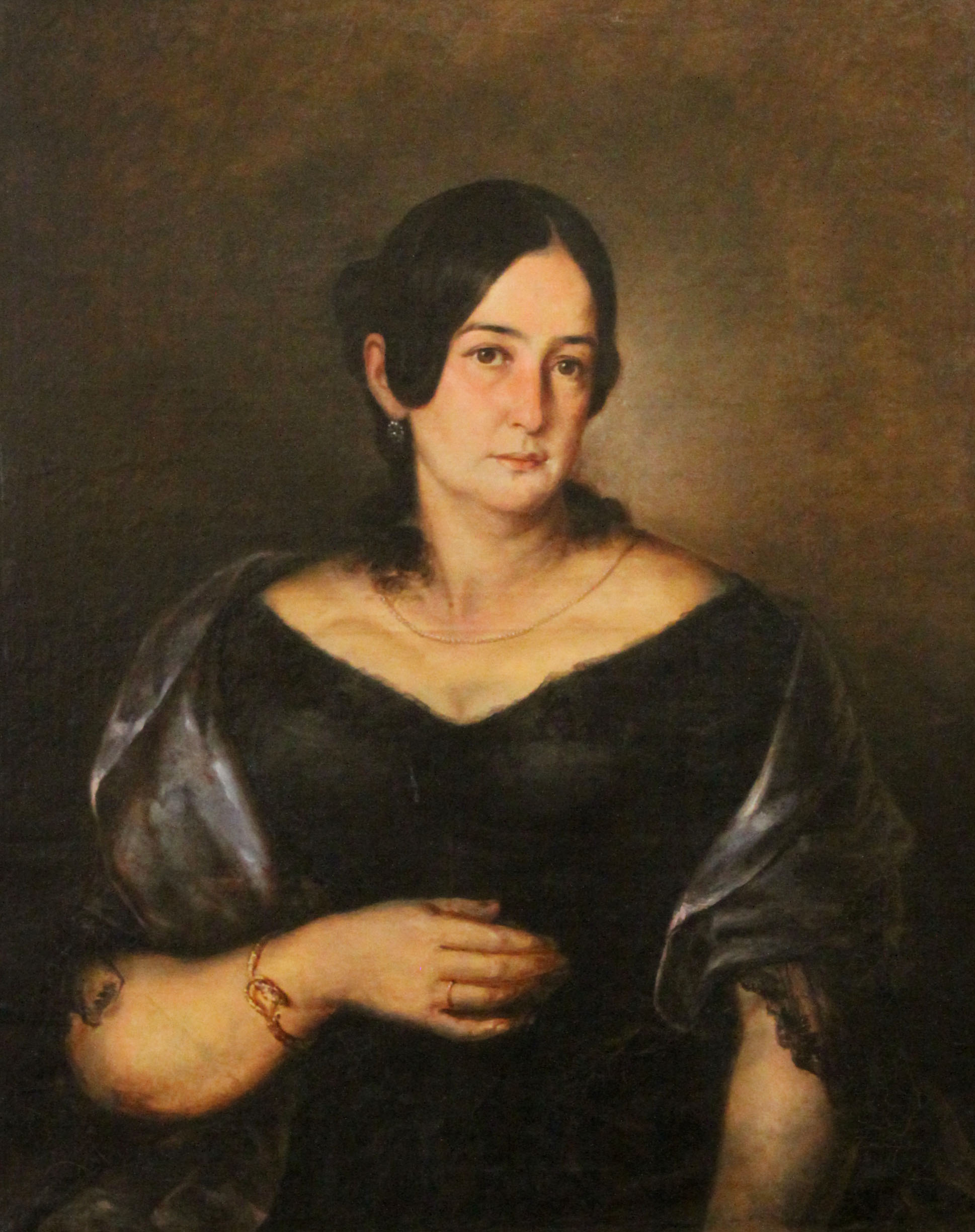 Retrato de Luísa Francisca Panasco - sem assinatura - Luís Godofredo Escragnole Taunay, 1941.